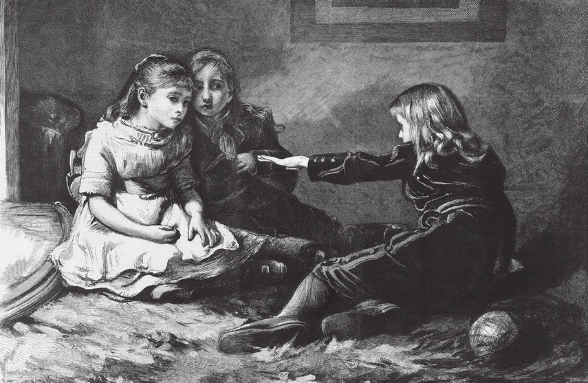 Little Mim (The Graphic)